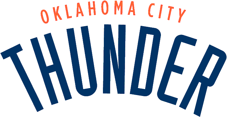 Oklahoma City Thunder wordmark logo